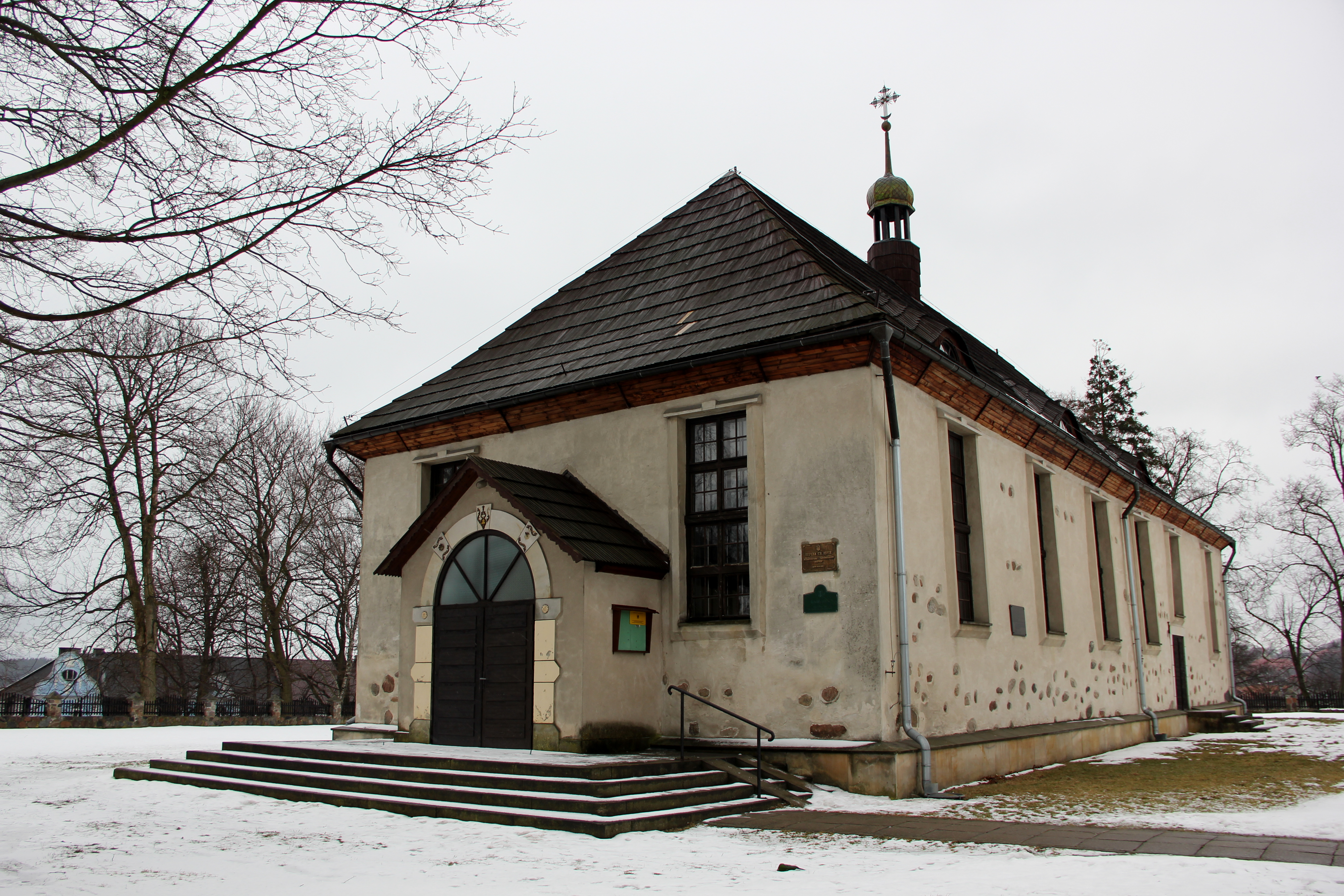 Kościół p.w. Św. Jerzego w Bytowie